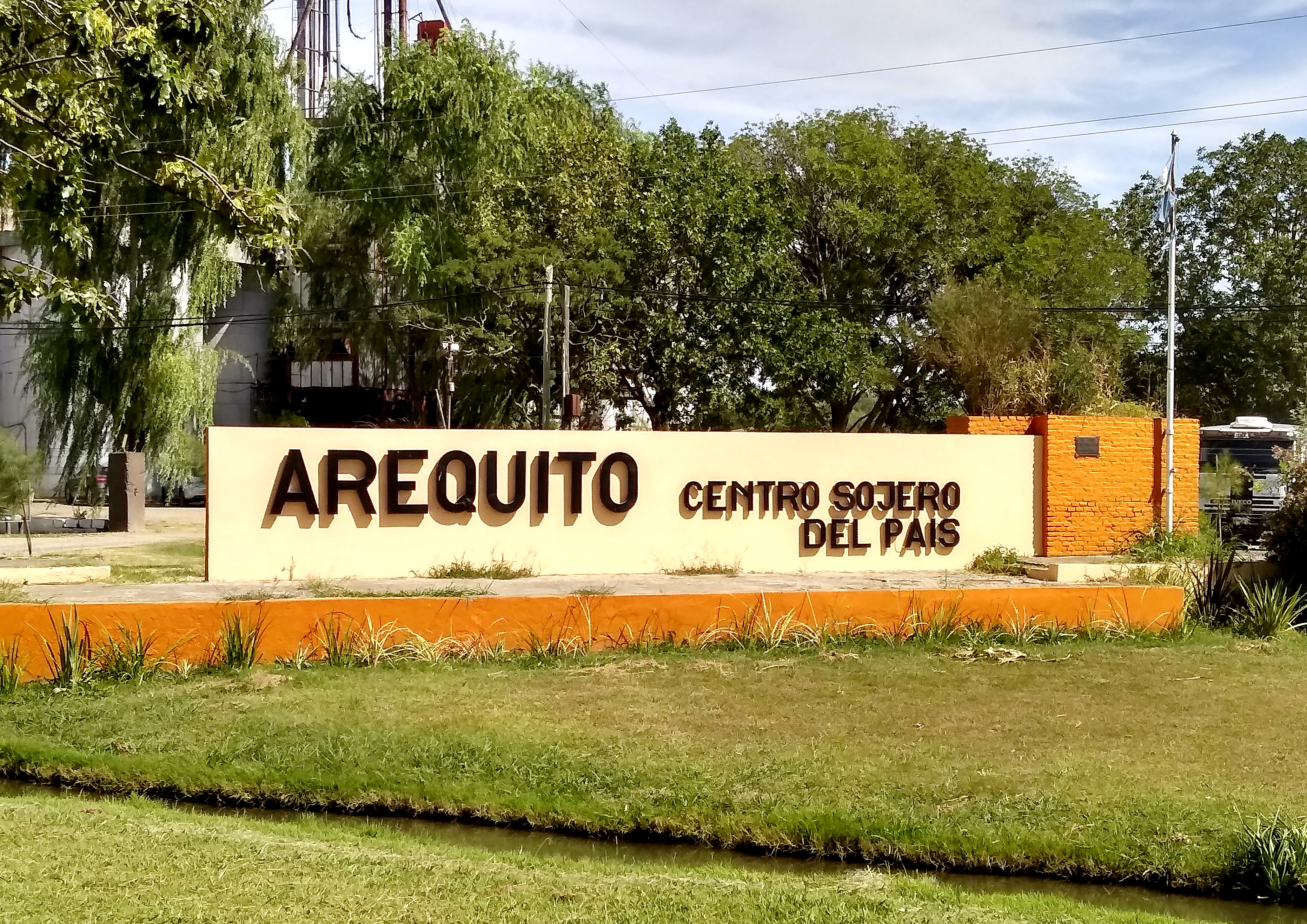 Arequito, Departamento Caseros, Santa Fe, Argentina